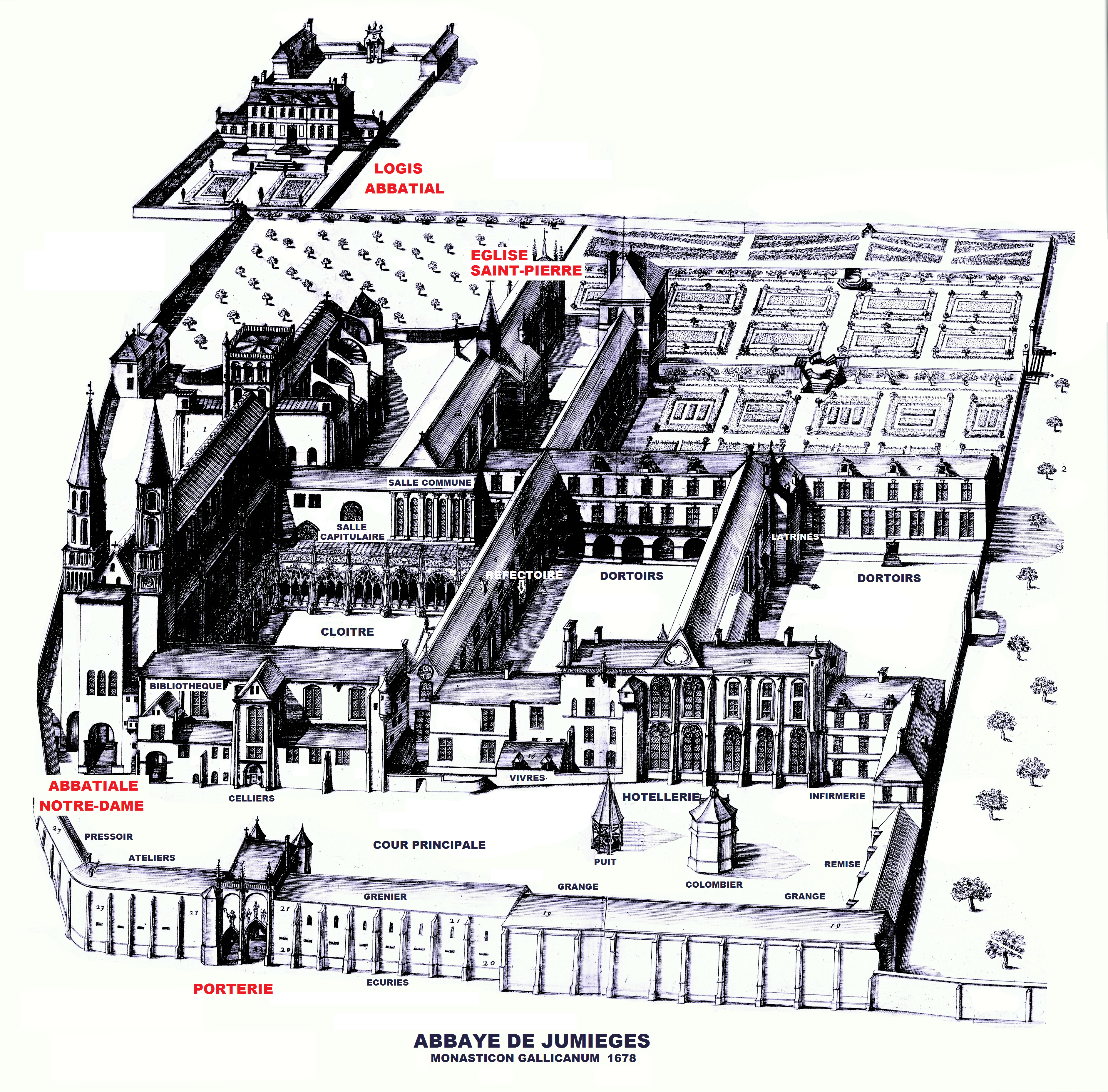 Abbaye de Jumieges, Gravure de 1678 (image du domaine public:" Monasticon Gallicanum", modifiée)